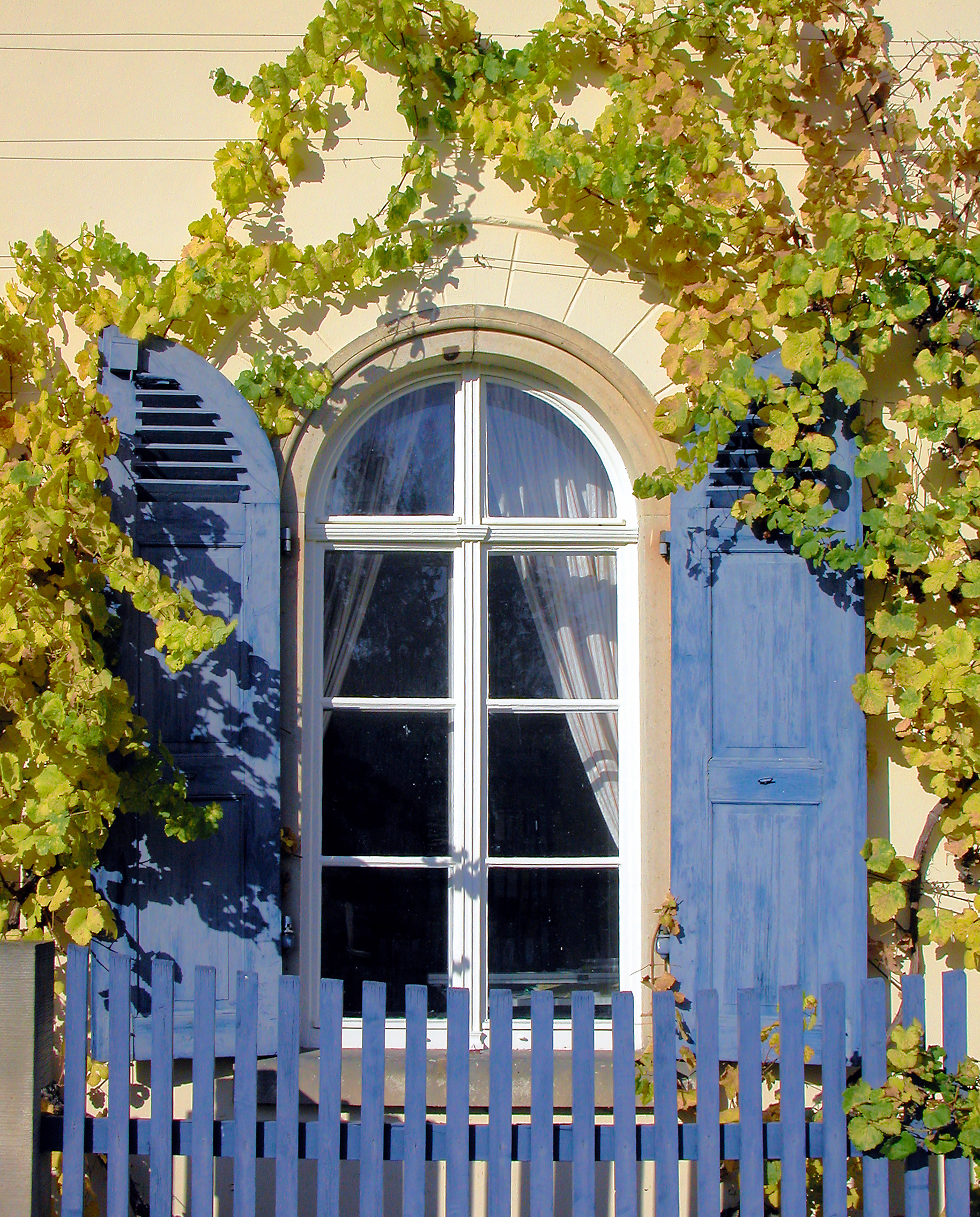 23.10.2008 01445 Radebeul-Oberlößnitz, Weinbergstraße 10: Meinholds Weinberg. Die Landhausvilla wurde um 1850-53 von C. E. Johne für Familie Meinhold errichtet. [DSCN34896.TIF]20081023445DR.JPG(c)Blobelt